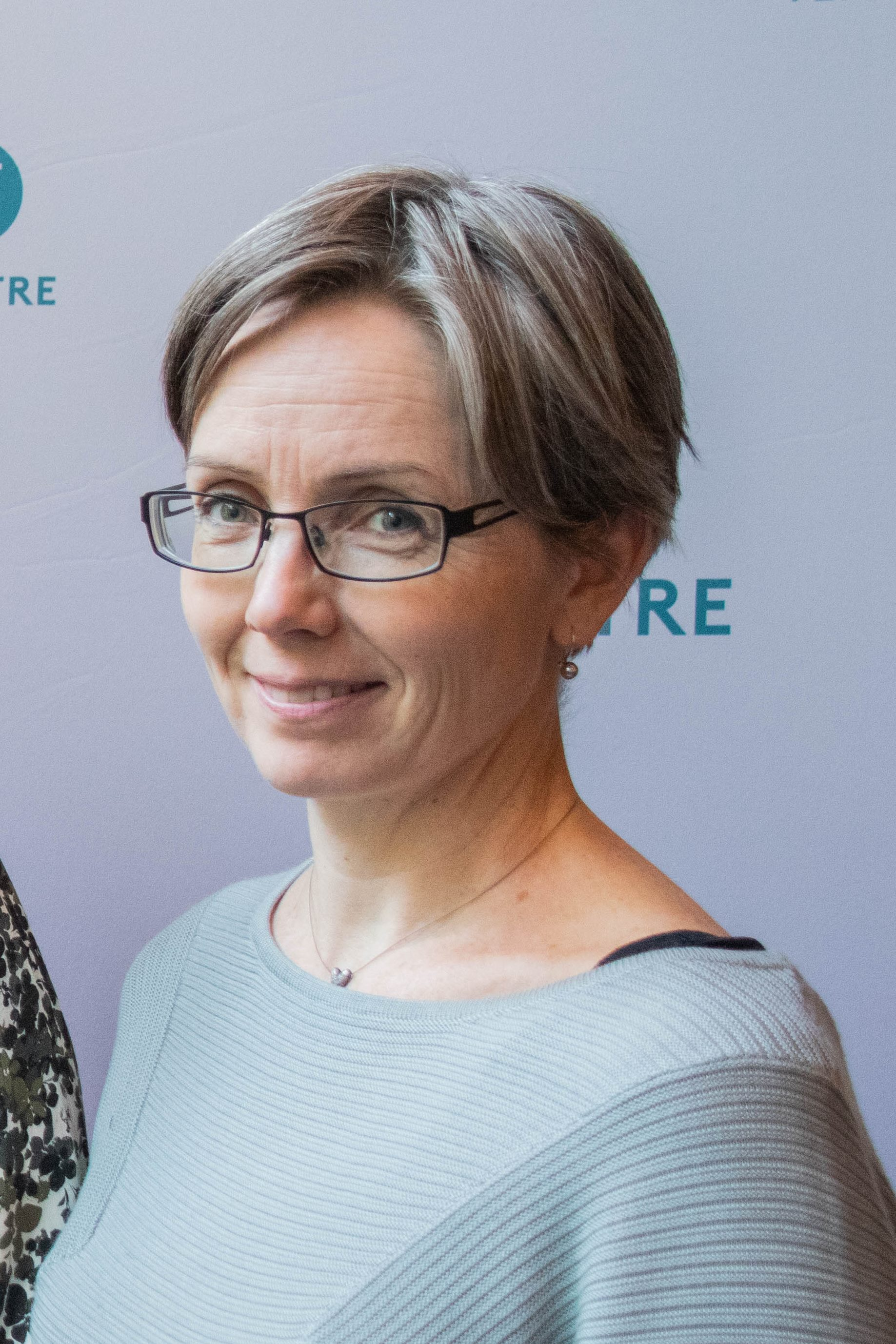 Marit H. Meyer fra Asker Venstre.